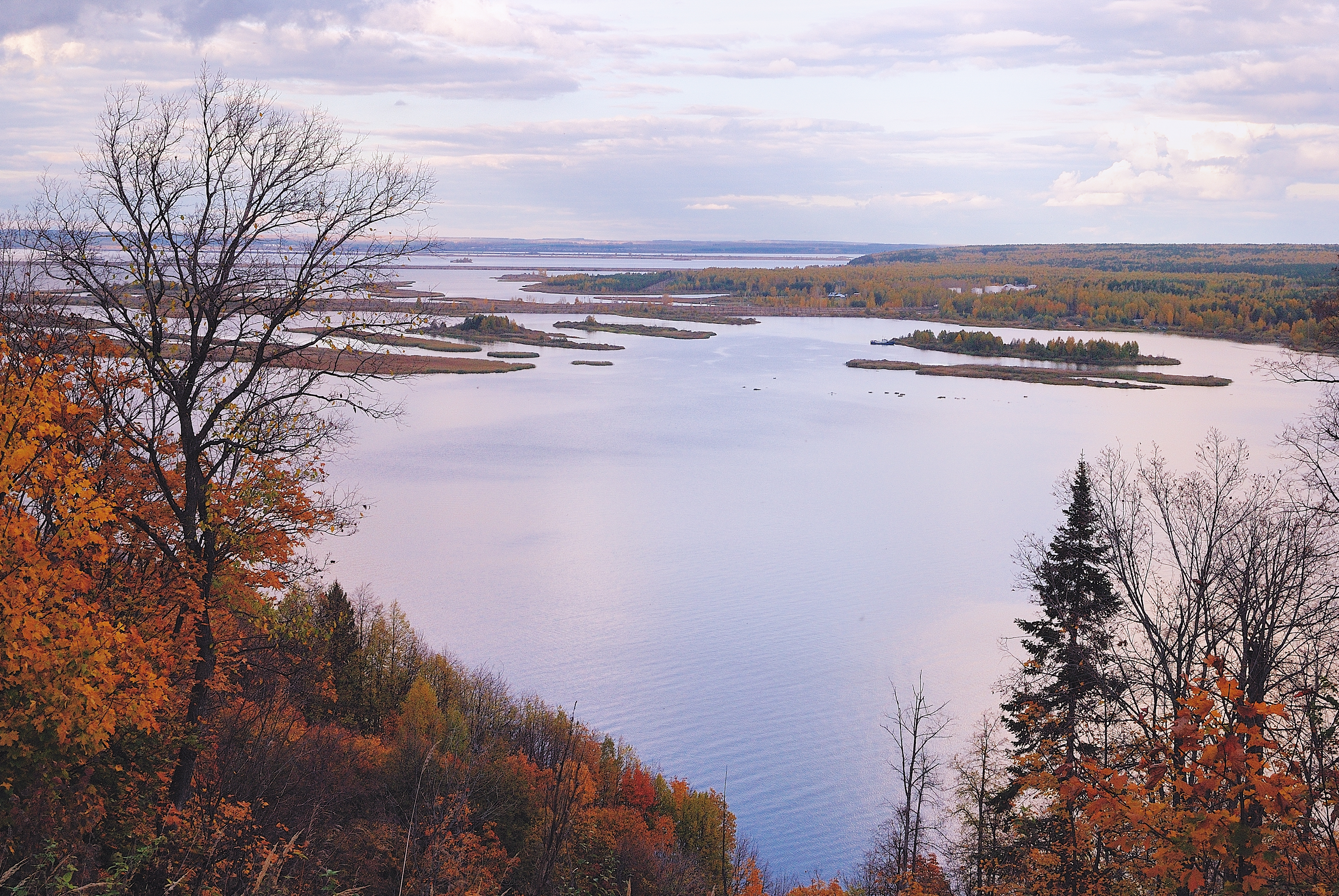 Нижняя Кама, Елабужский район This image is related to the protected area of Russia number 1600076